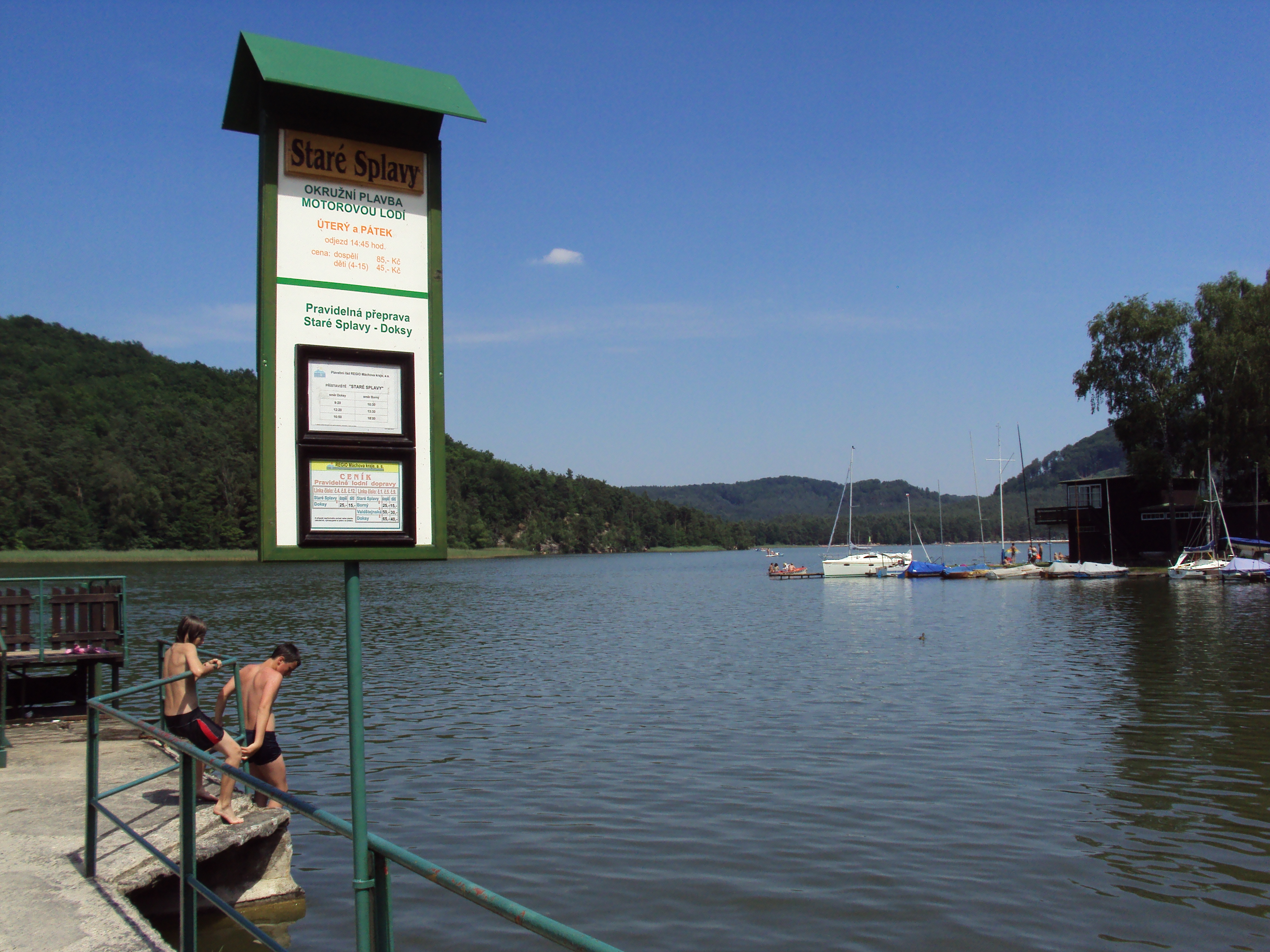 Informační cedule na přístavním molu Máchova jezera ve Starých Splavech